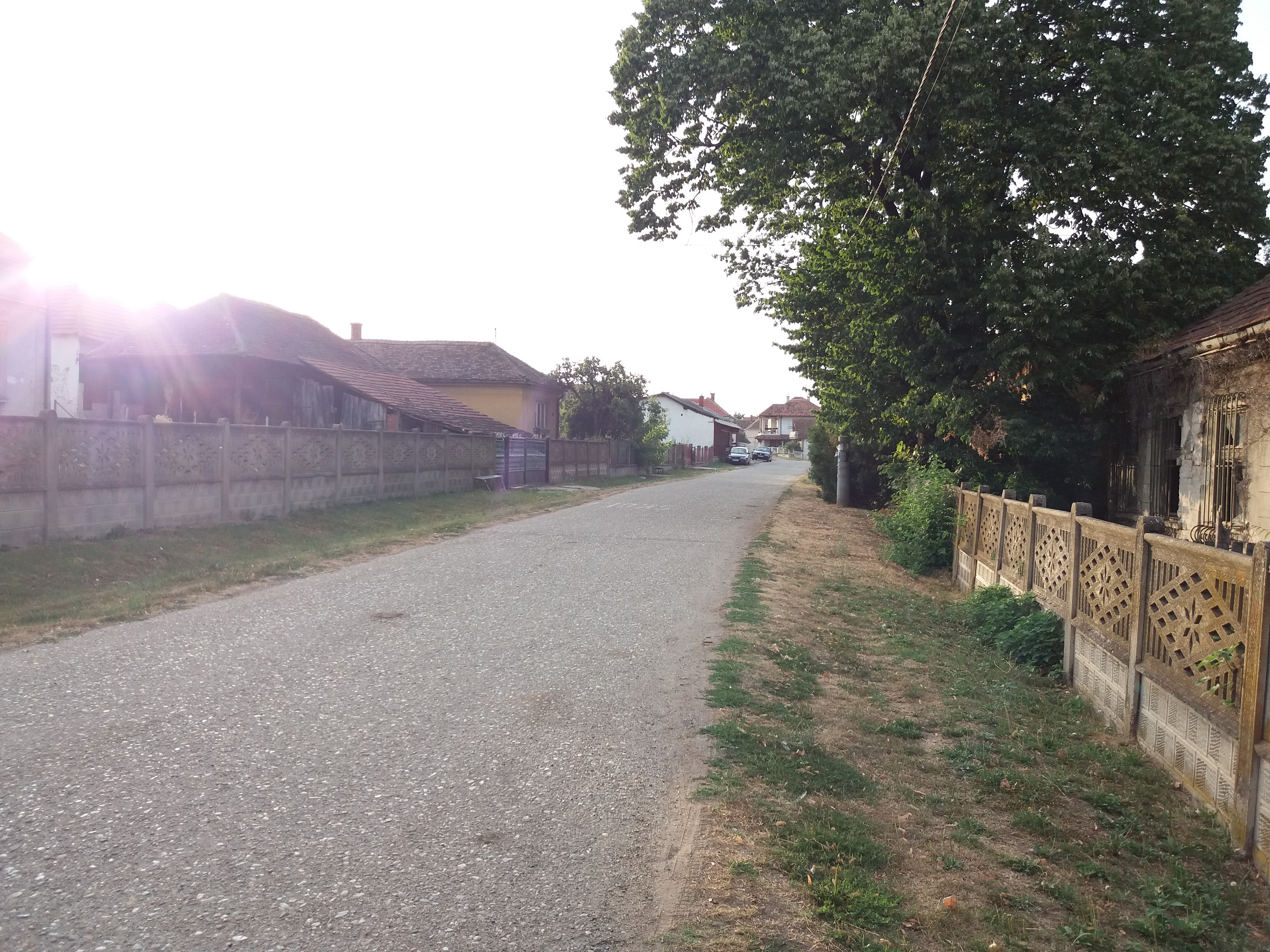 Srpski (latinica): Mala Plana